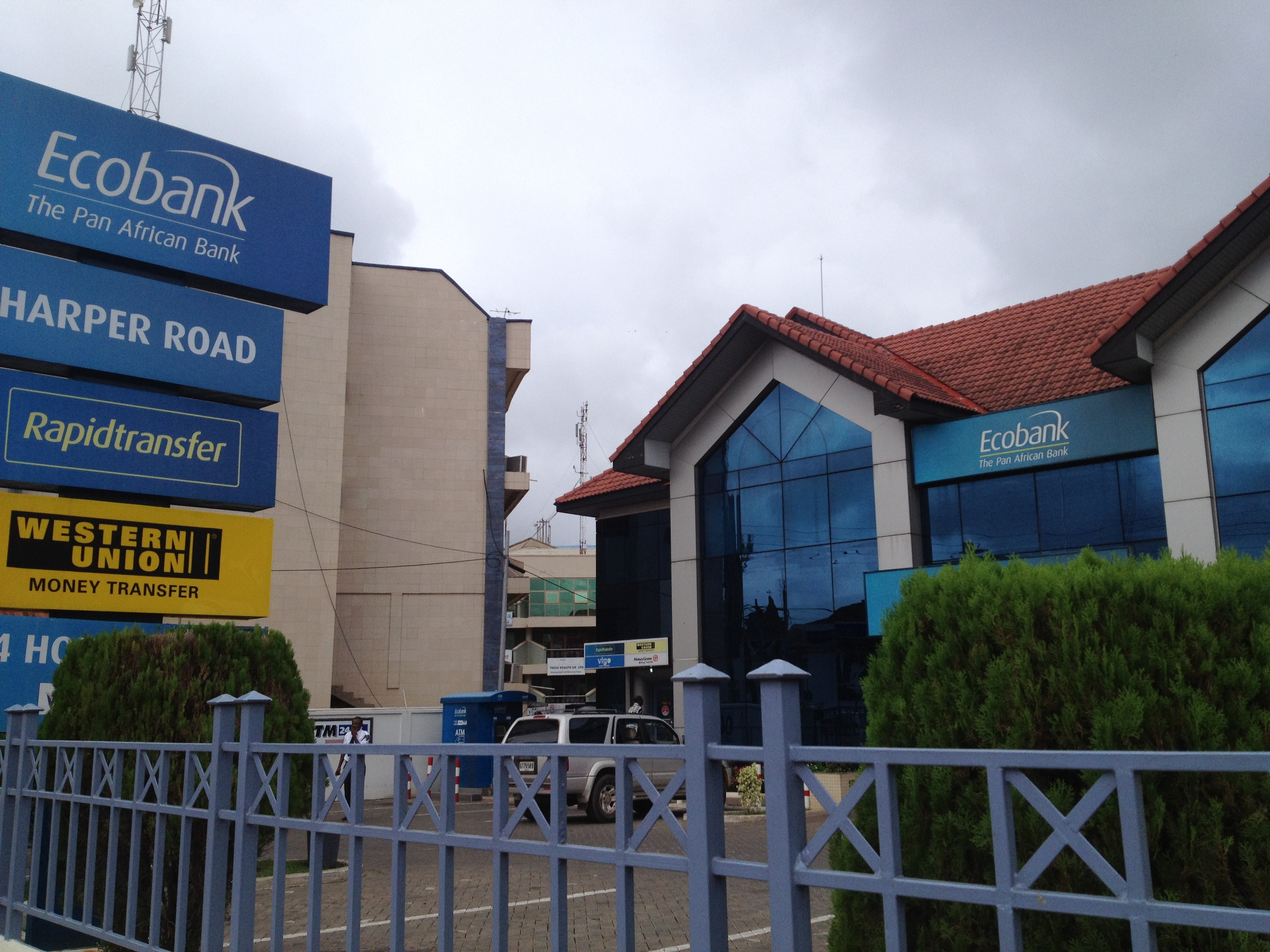 エコバンク・ガーナ（クマシのハーパーロード支店）